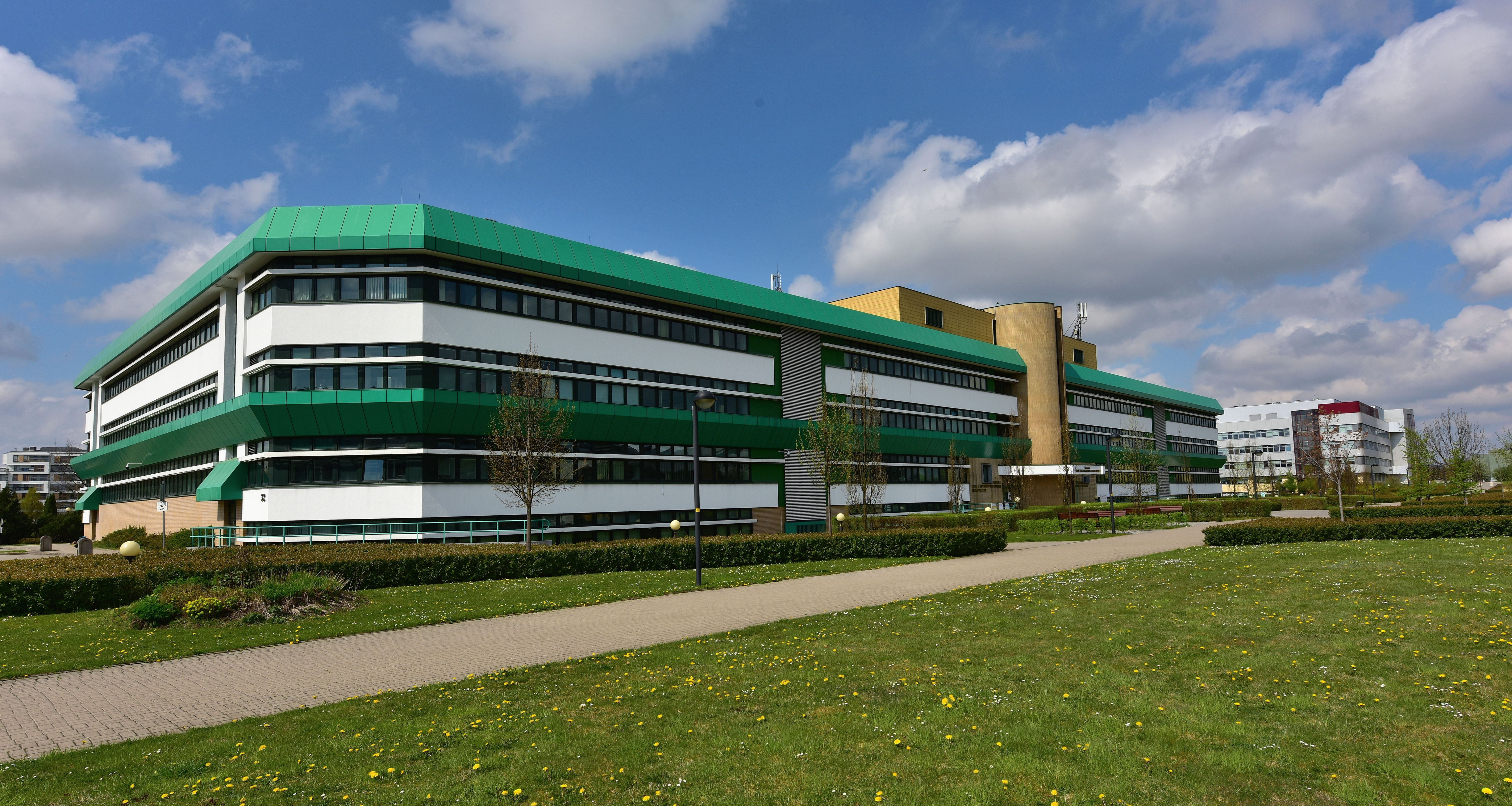 Kampus SGGW. Gmach im. Eugeniusza Pijanowskiego przy ul. Nowoursynowskiej 159c